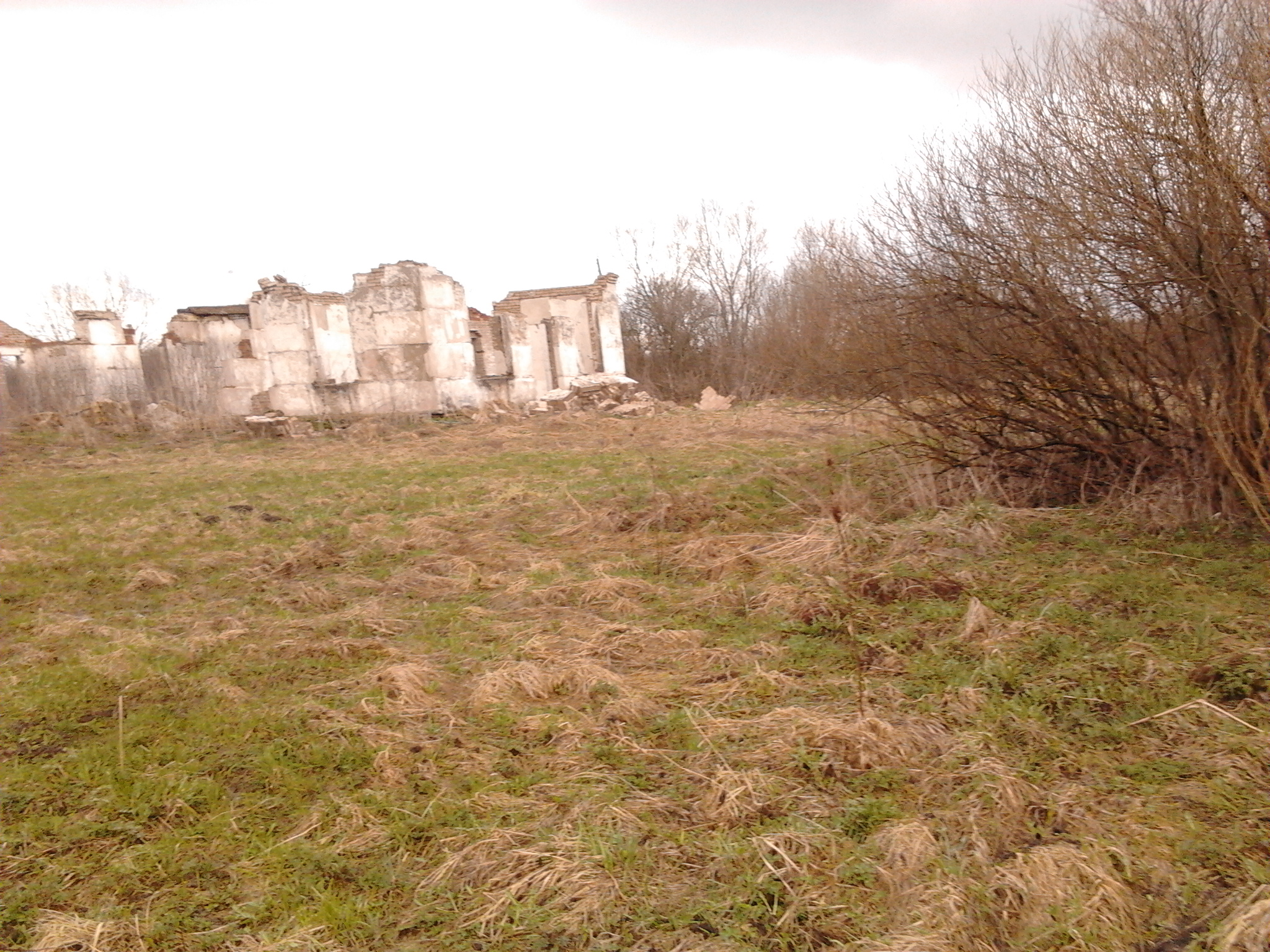 Клуб в деревне Гора.